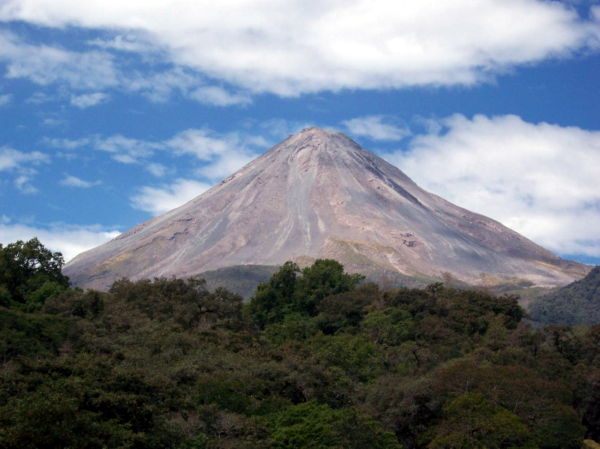 Colima Volcano (Fuego)